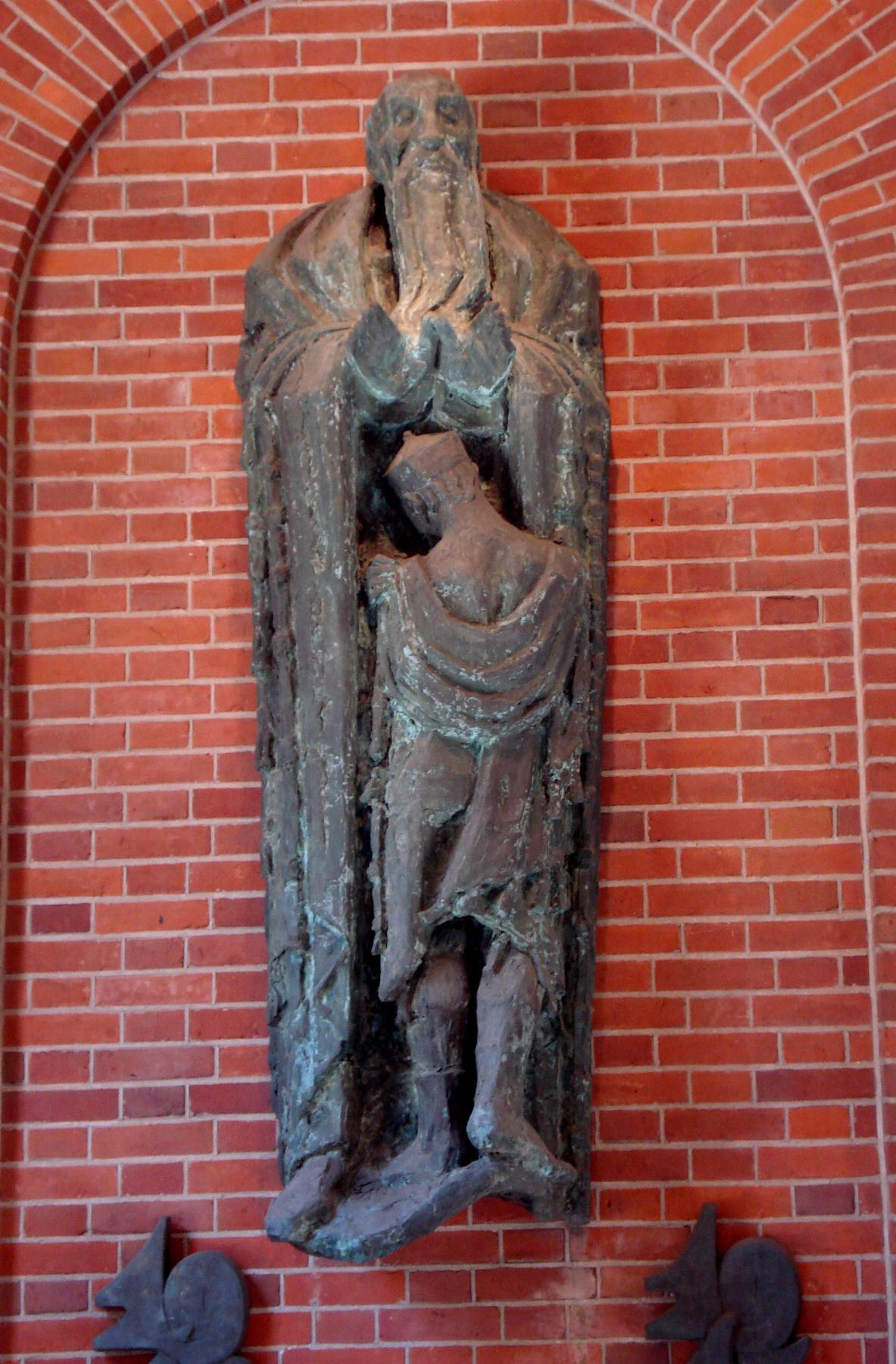 Rotterdam, stadshuis. Joods monument(1) van Loekie Metz. Rotterdam/The Netherlands.